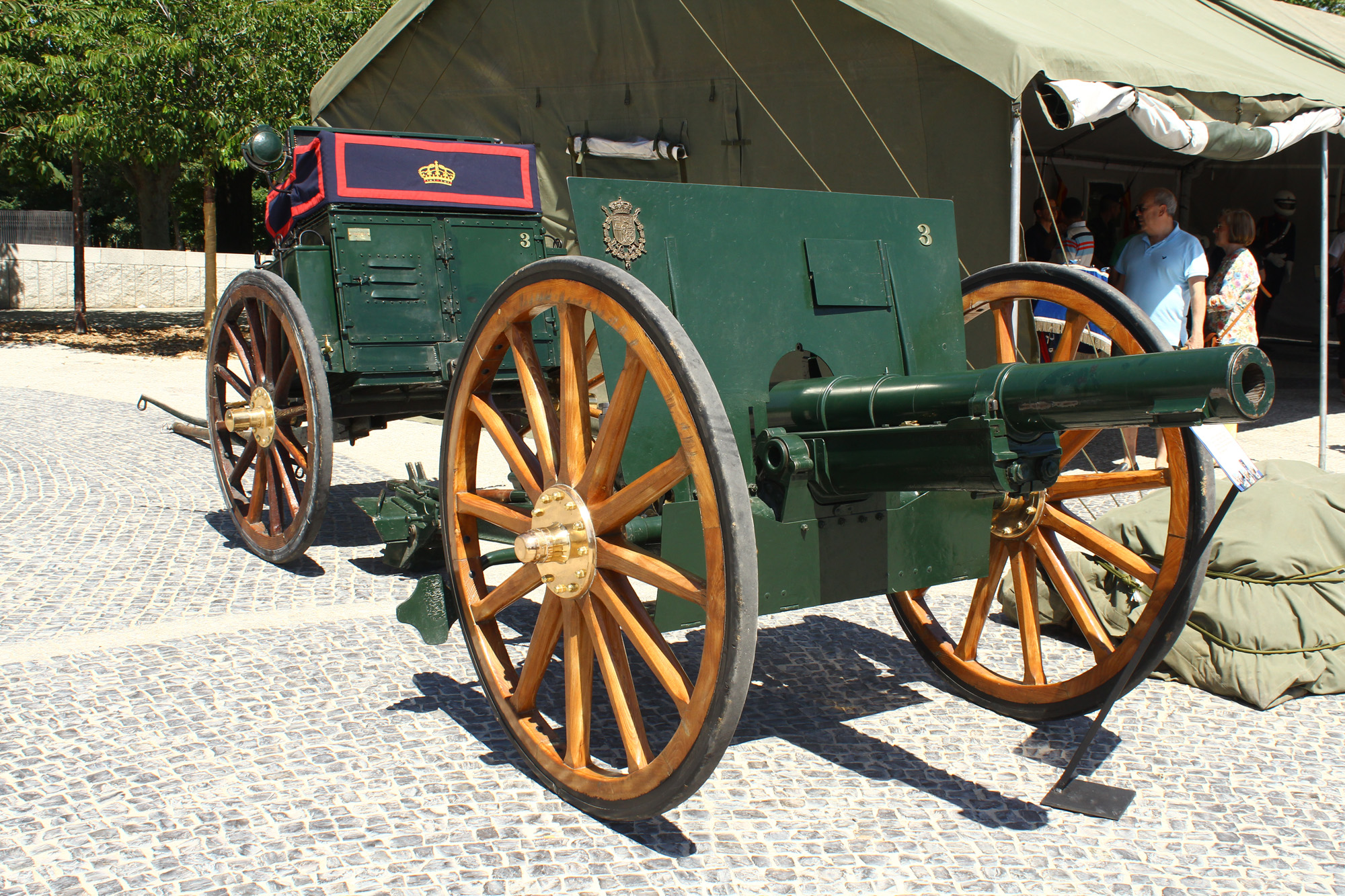 Exposición en Madrid Río con motivo del Día de las Fuerzas Armadas. Domingo 8 de junio de 2014.